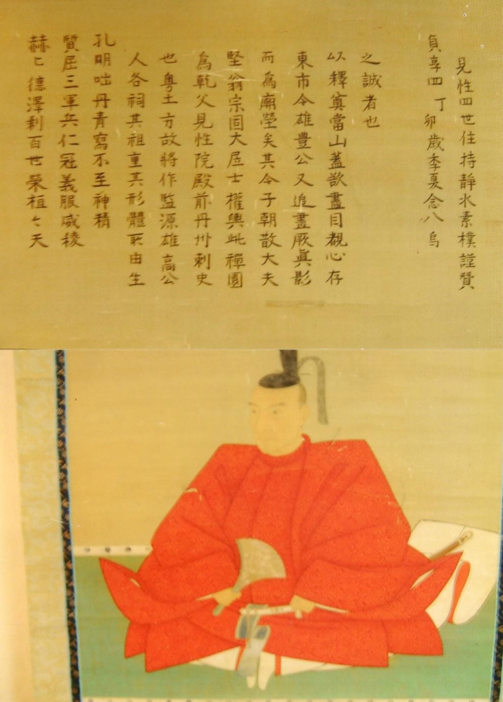 土方雄氏の肖像。